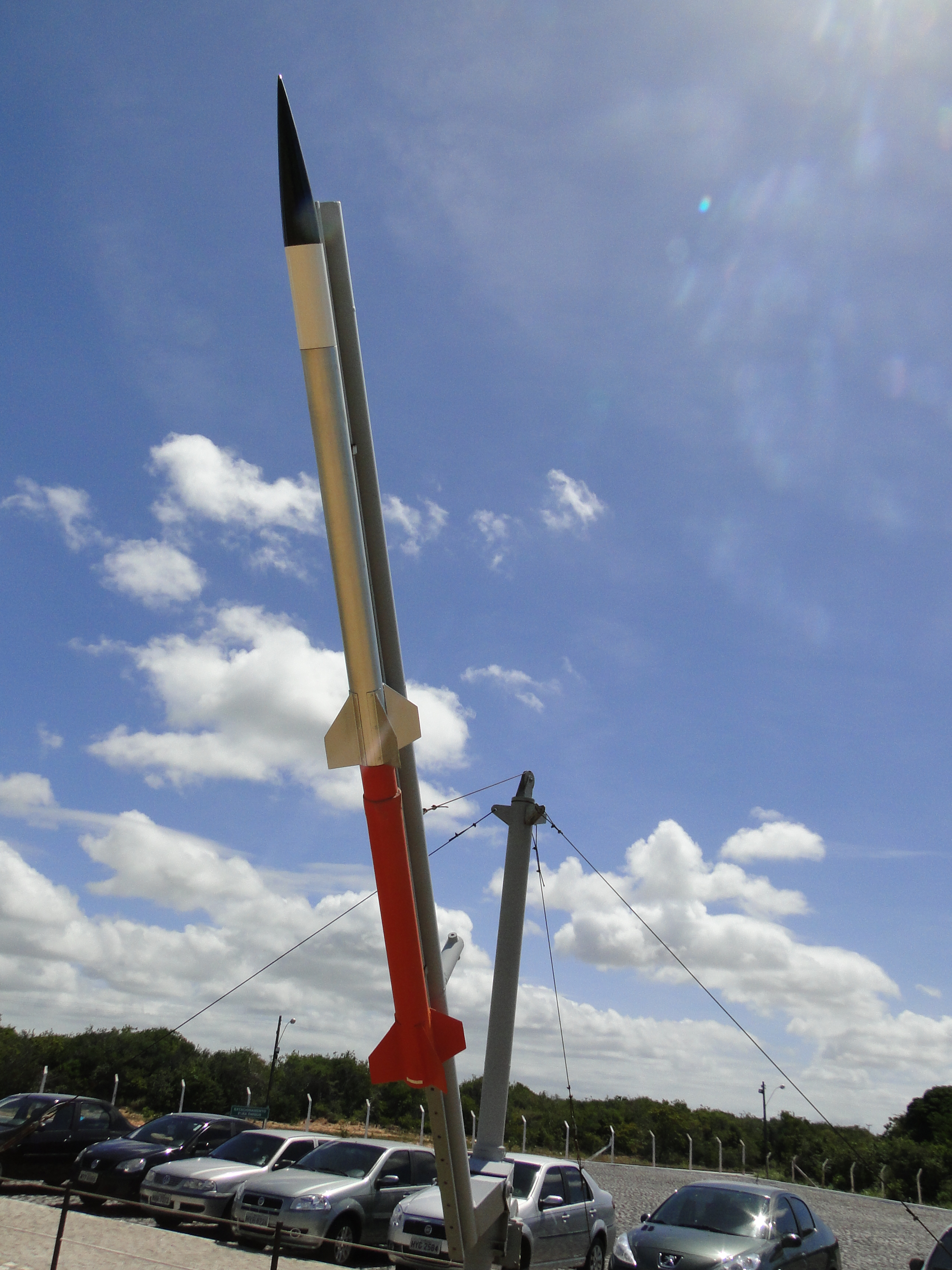 Modelo do foguete Sonda I em exposição.